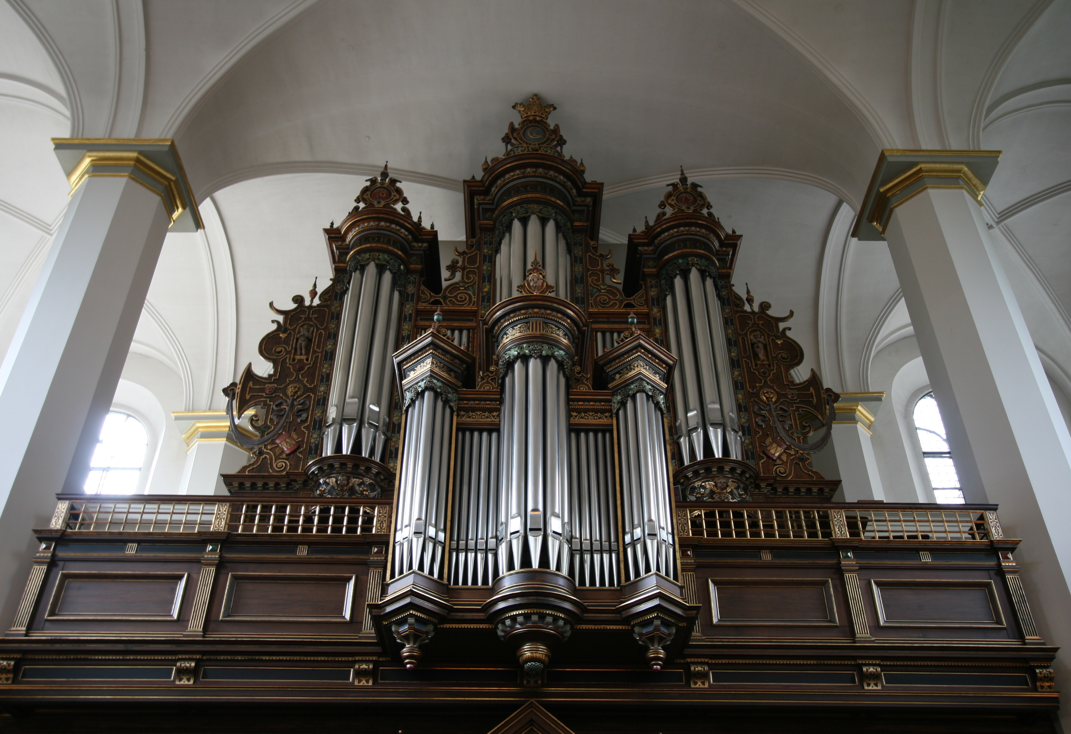 Helligåndskirken, Copenhagen, Denmark. Main organ.